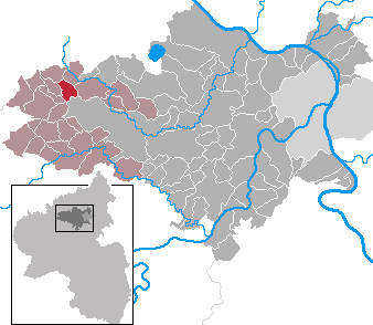 Langenfeld in Rhineland-Palatinate - district Mayen-Koblenz